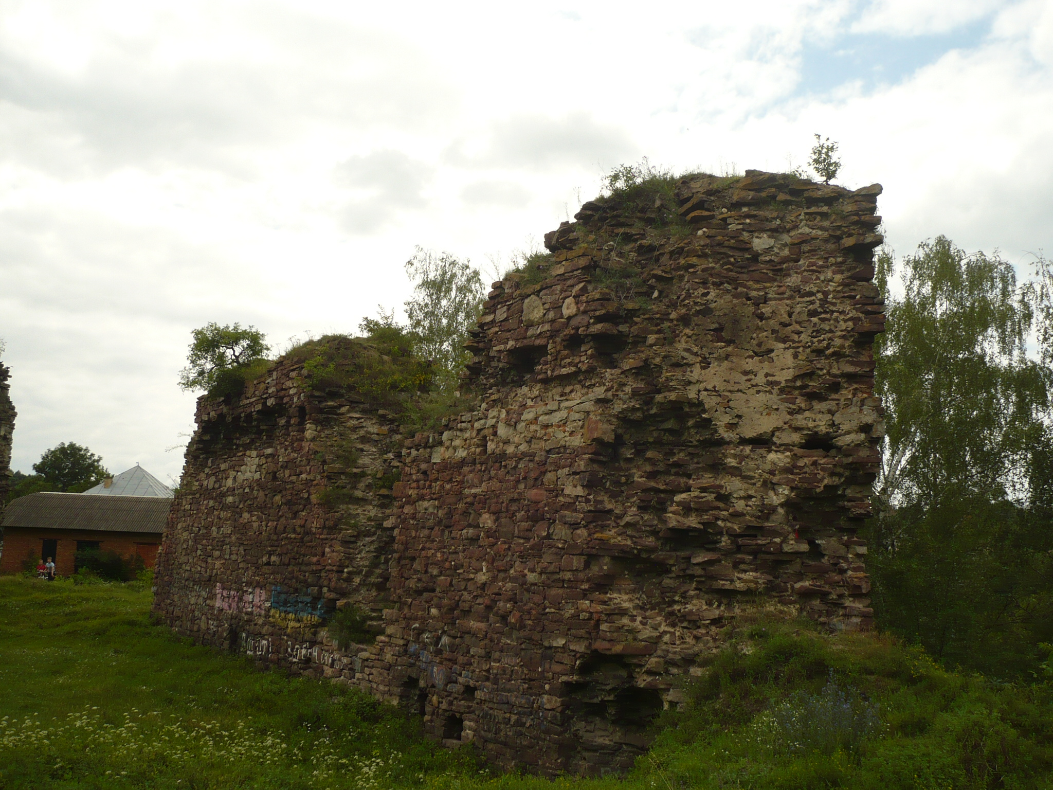 Buczacz. Zamek